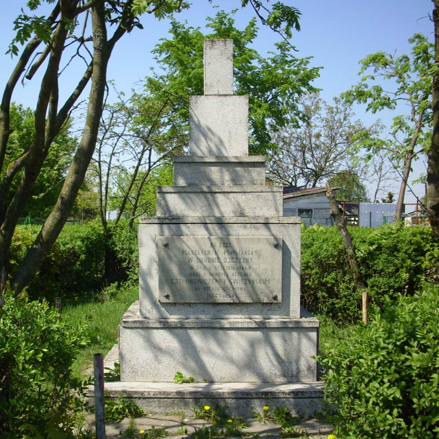 Pomnik z inskrypcją Ku czci poległych 17 powstańców w obronie ojczyzny w dniu 6 stycznia 1864 r wraz z dowódcą oddziału Ejtminowiczem i Świeżyńskim na polach Uścimowa 1864 ‒ 1934.